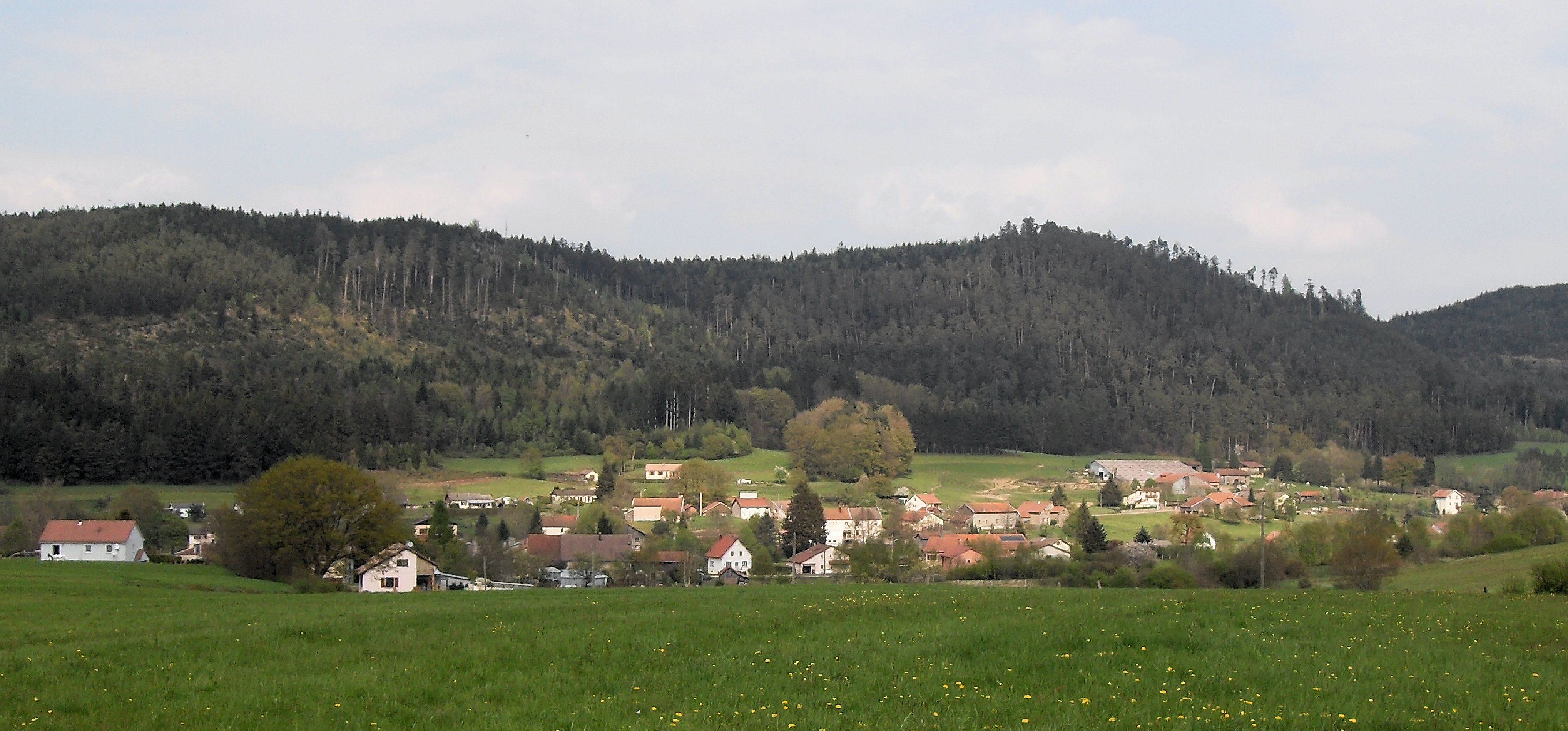 Vue depuis le sud-ouest sur Domfaing